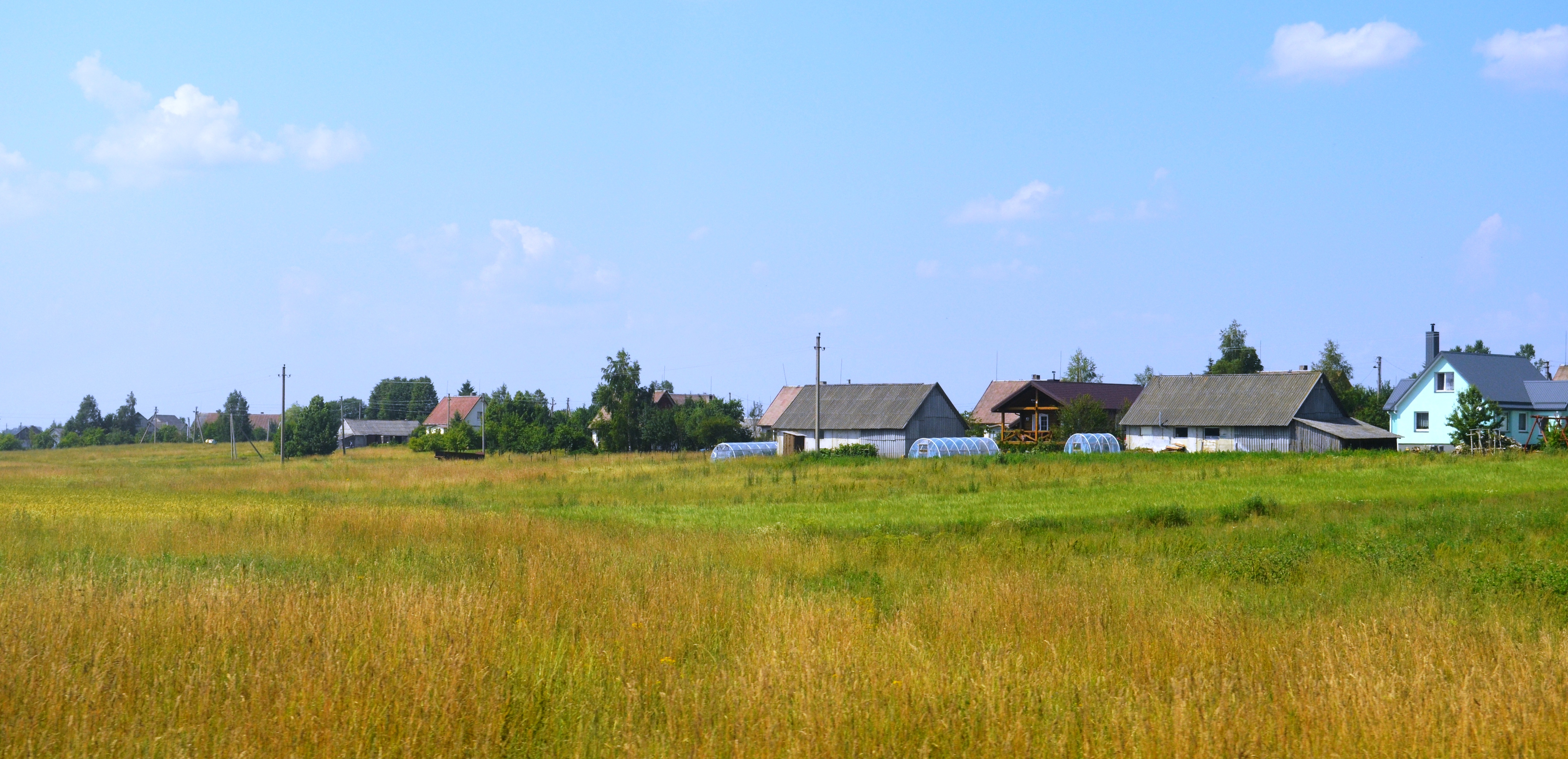 Vileikiškiai, Širvintų raj.